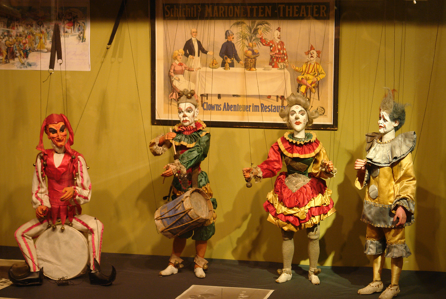 Lübecker Theaterfigurenmuseum